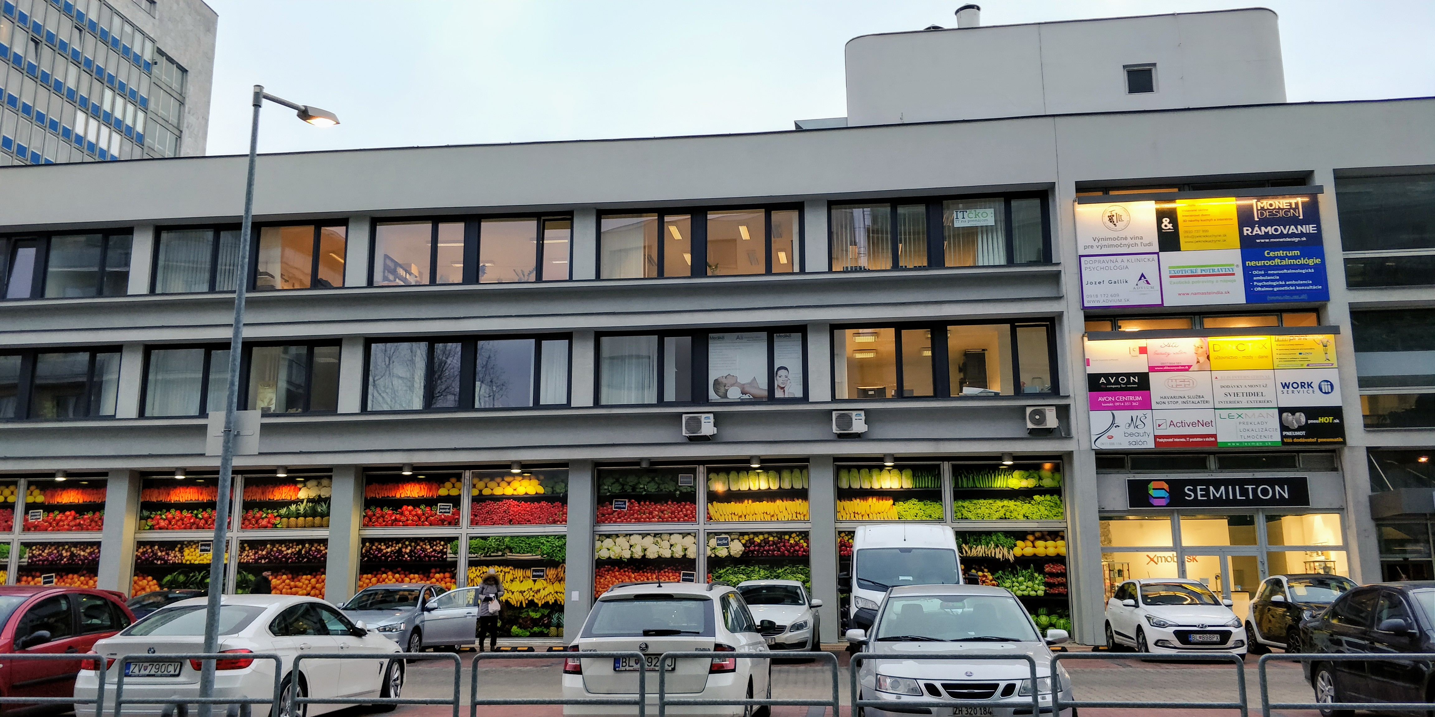 Škultétyho 1, Bratislava, Slovakia